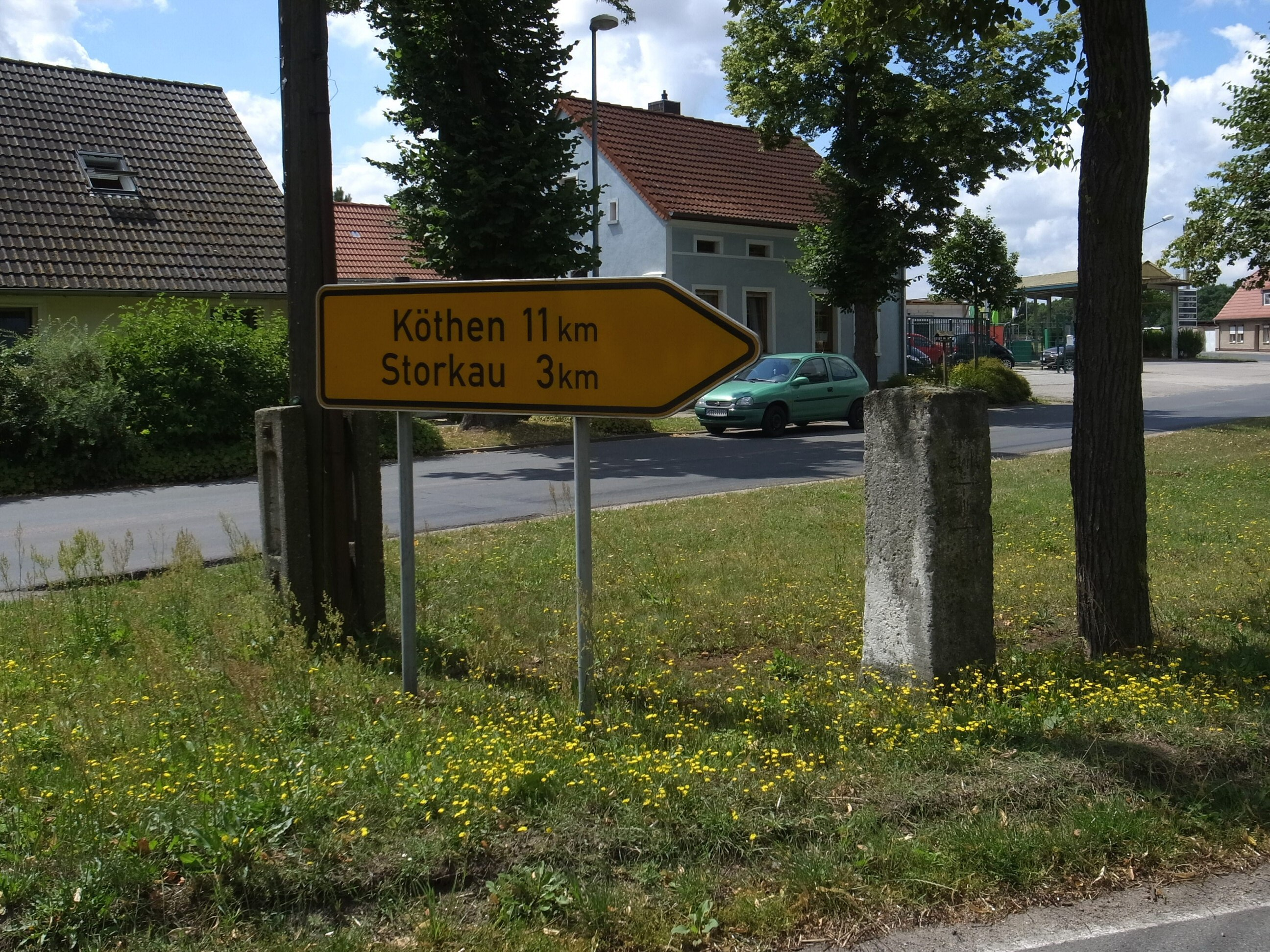 Südliches Anhalt, Ortsteil Quellendorf, Wegweiser Köthener Straße/Ecke Siedlung